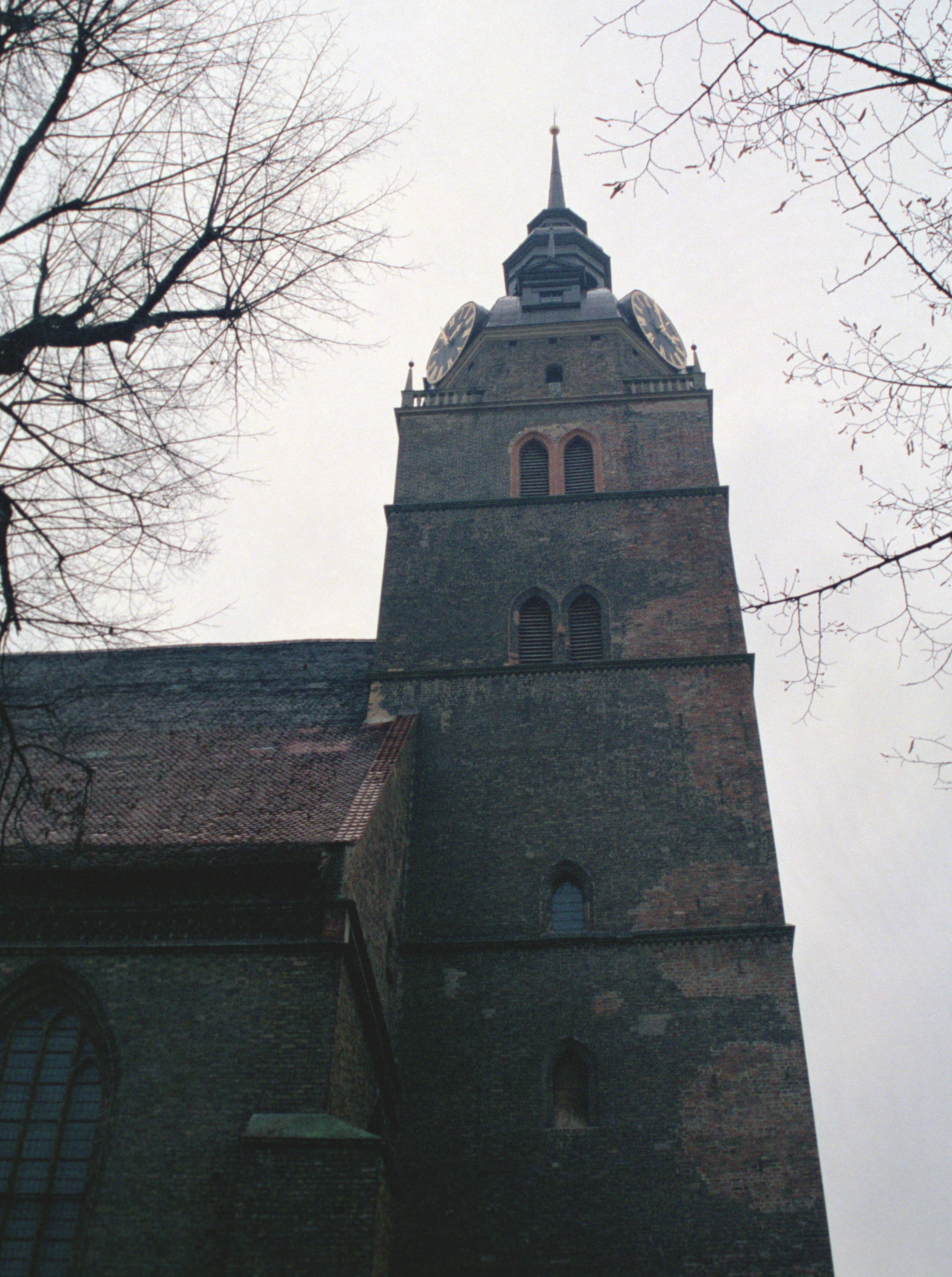 Turm der St. Katharinenkirche, Mitte November 1997.